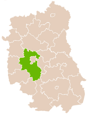 Map of Lublin county, Lublin voivodship Mapa powiatu lubelskiego, województwo lubelskie